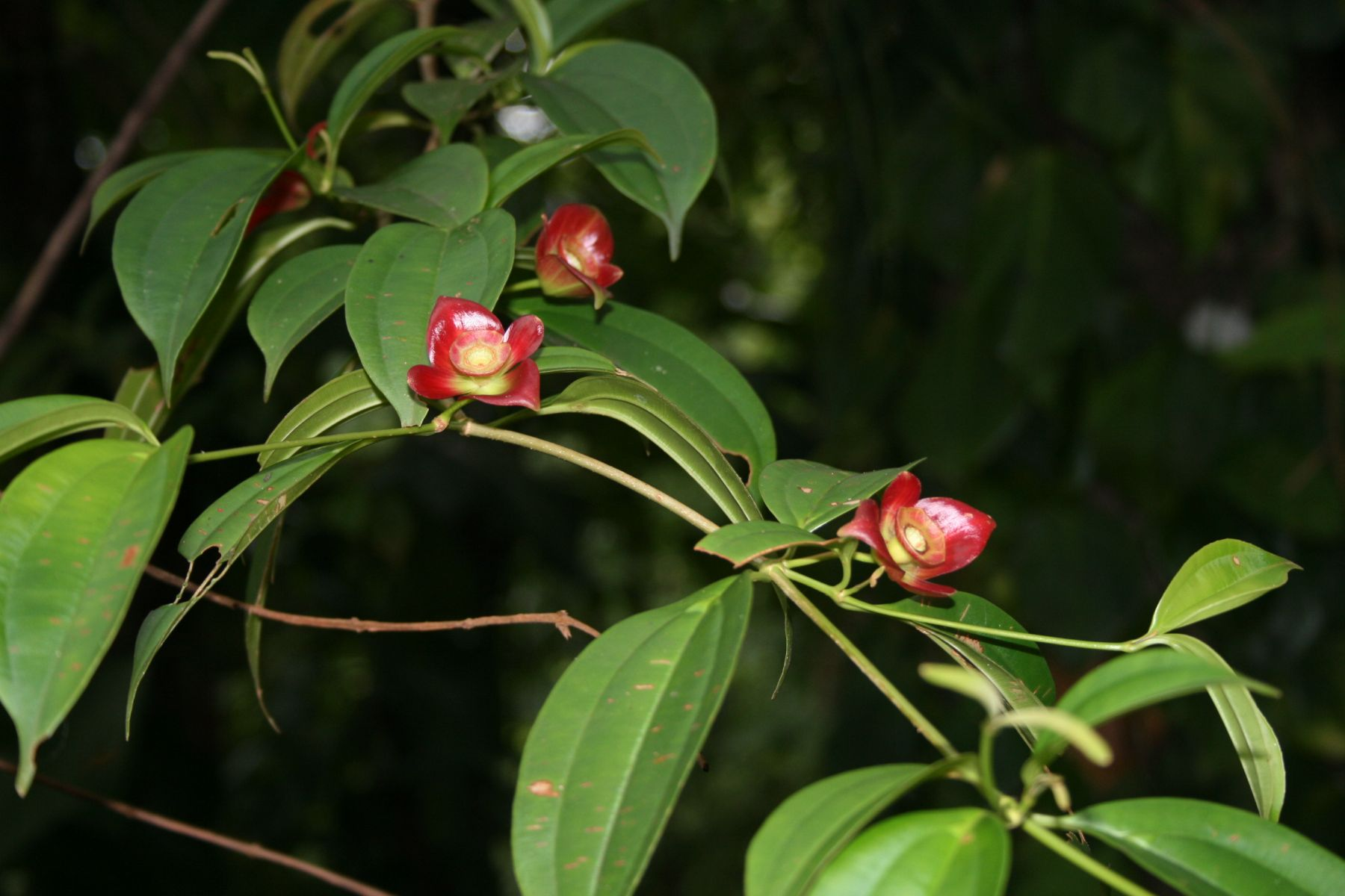 Blakea litoralis, Schwarzmundgewächse (Melastomataceae) - Costa Rica: Prov. Puntarenas, La Gamba NW Golfito, "Fila Trail" NW "Tropenstation La Gamba"/"Estación Biológica La Gamba"